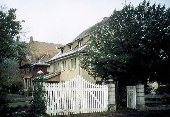 Außenaufnahme des ehemaligen Hachschara-Zentrums Markenhof bei Kirchzarten